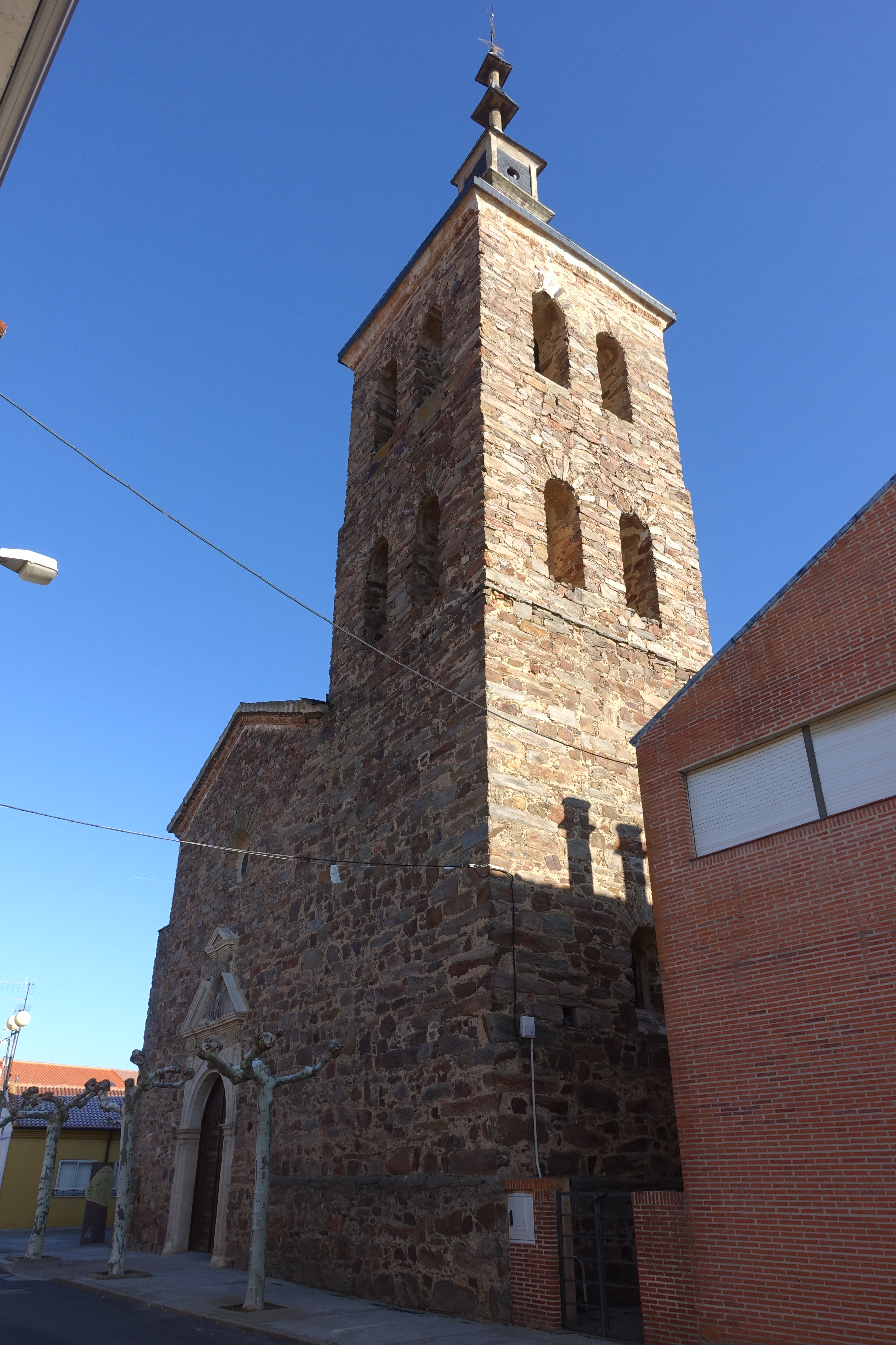 Iglesia de San Martín Obispo, Villarejo de Órbigo (León, España).